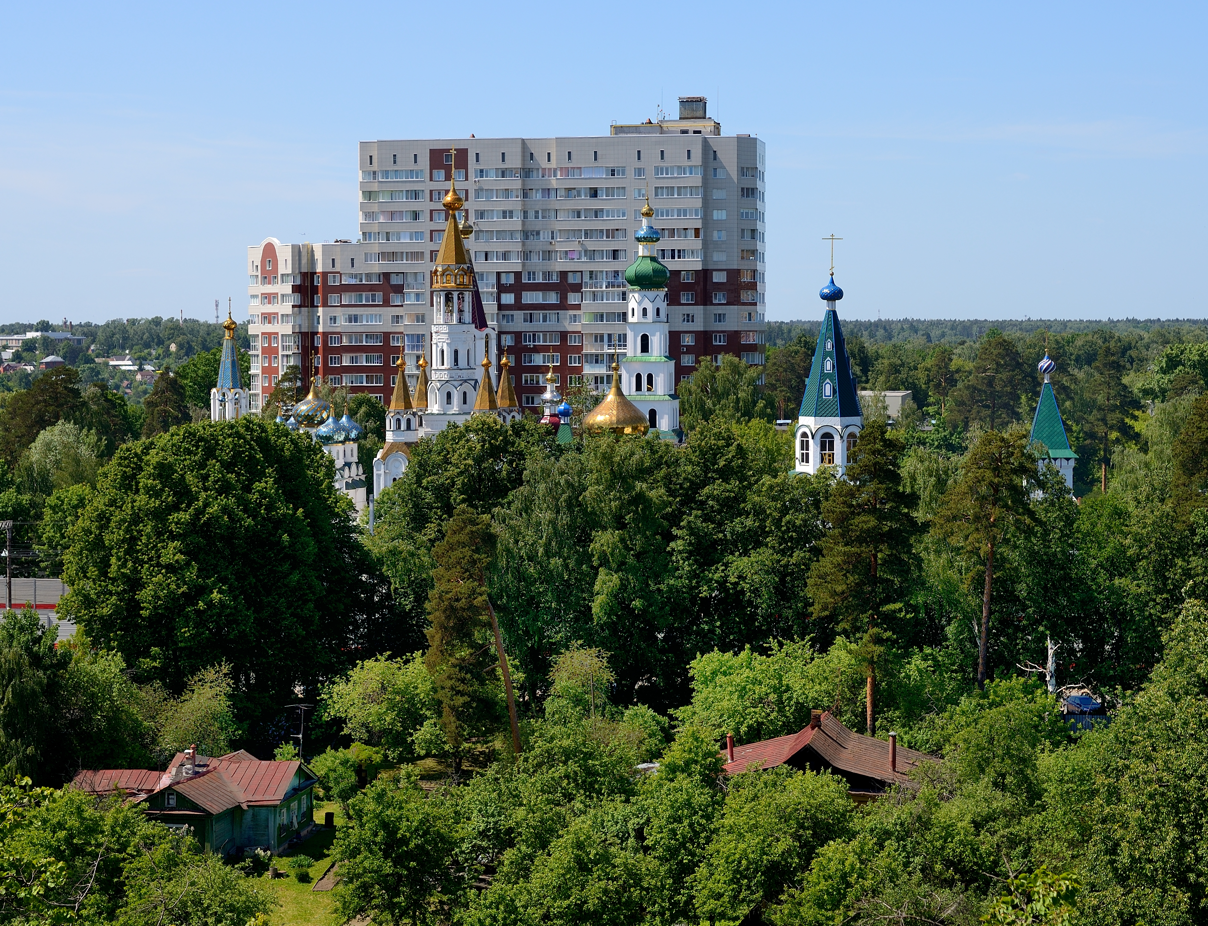 Город Пушкино Московской области, вид на Боголюбский храм и новостройки